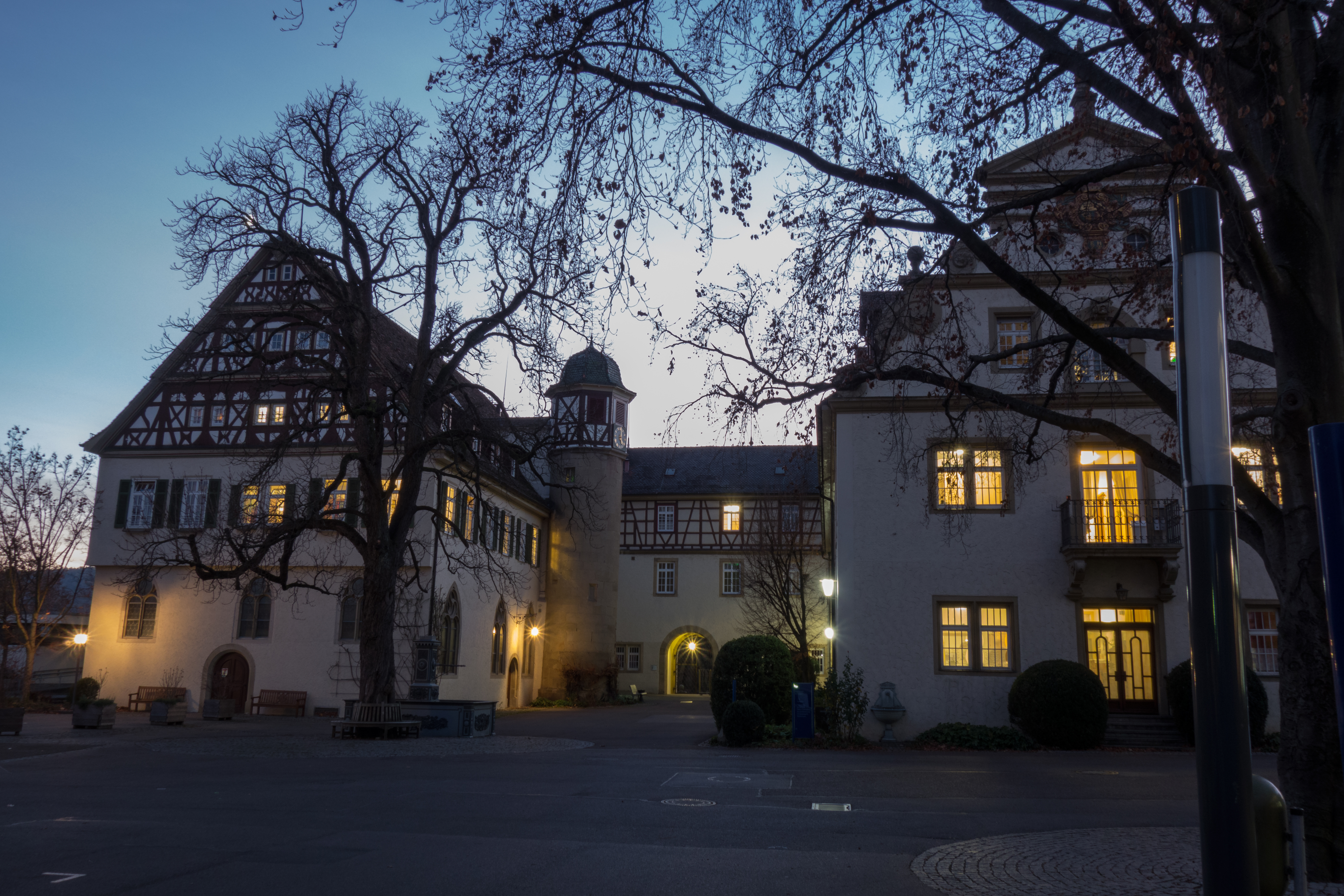 Schloss Stetten in Kernen im Remstal.